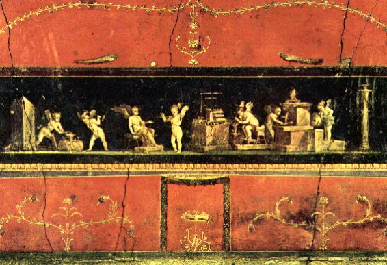 Scena di coniazione, Casa dei Vettii a Pompei.